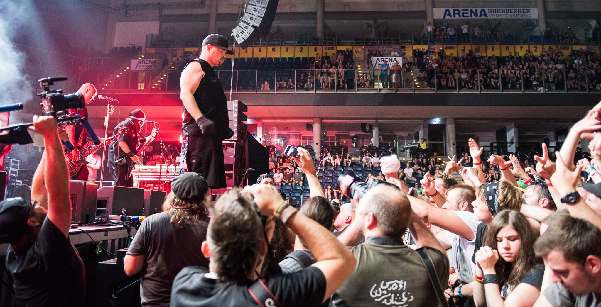 ARGO-Konzerte,Alternarena,Arena Nürnberger Versicherungen,Body Count feat. Ice-T,Festival,Ice-T,Konzert,Livekonzert,Livemusik,Musik,RiP,Rock im Park 2015,Tracy Lauren Marrow